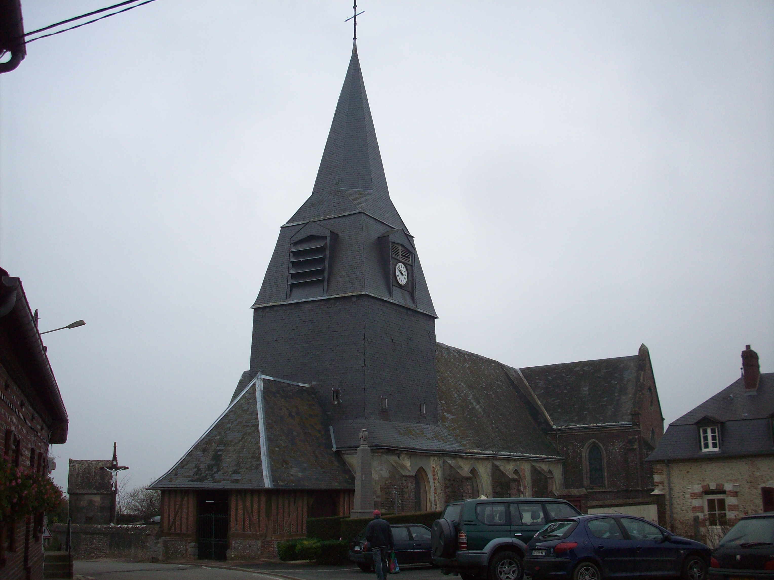 Eglise Saint-Nicolas de Beauvoir-en-Lyons.